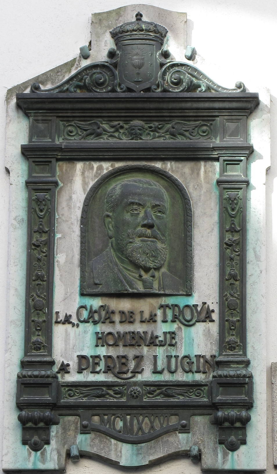 Alejandro Pérez Lugín, placa na Casa da Troya, Santiago de Compostela, Galiza